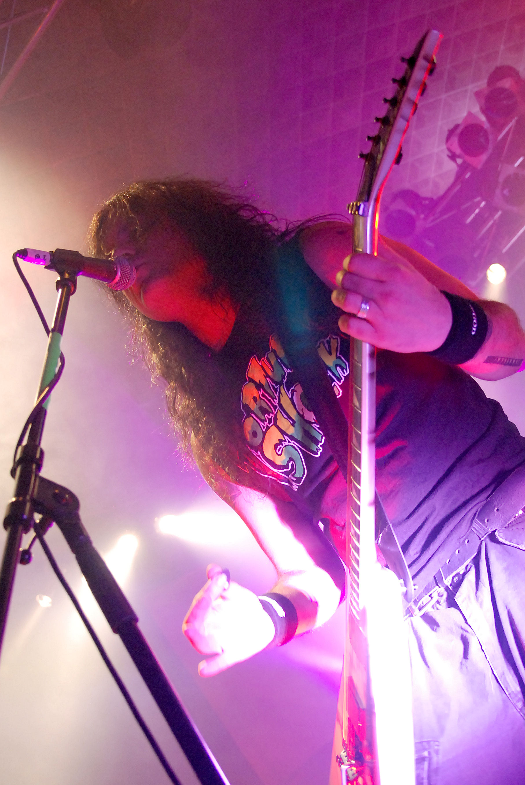 Kreator podczas koncertu w Klubie Studio w Krakowie